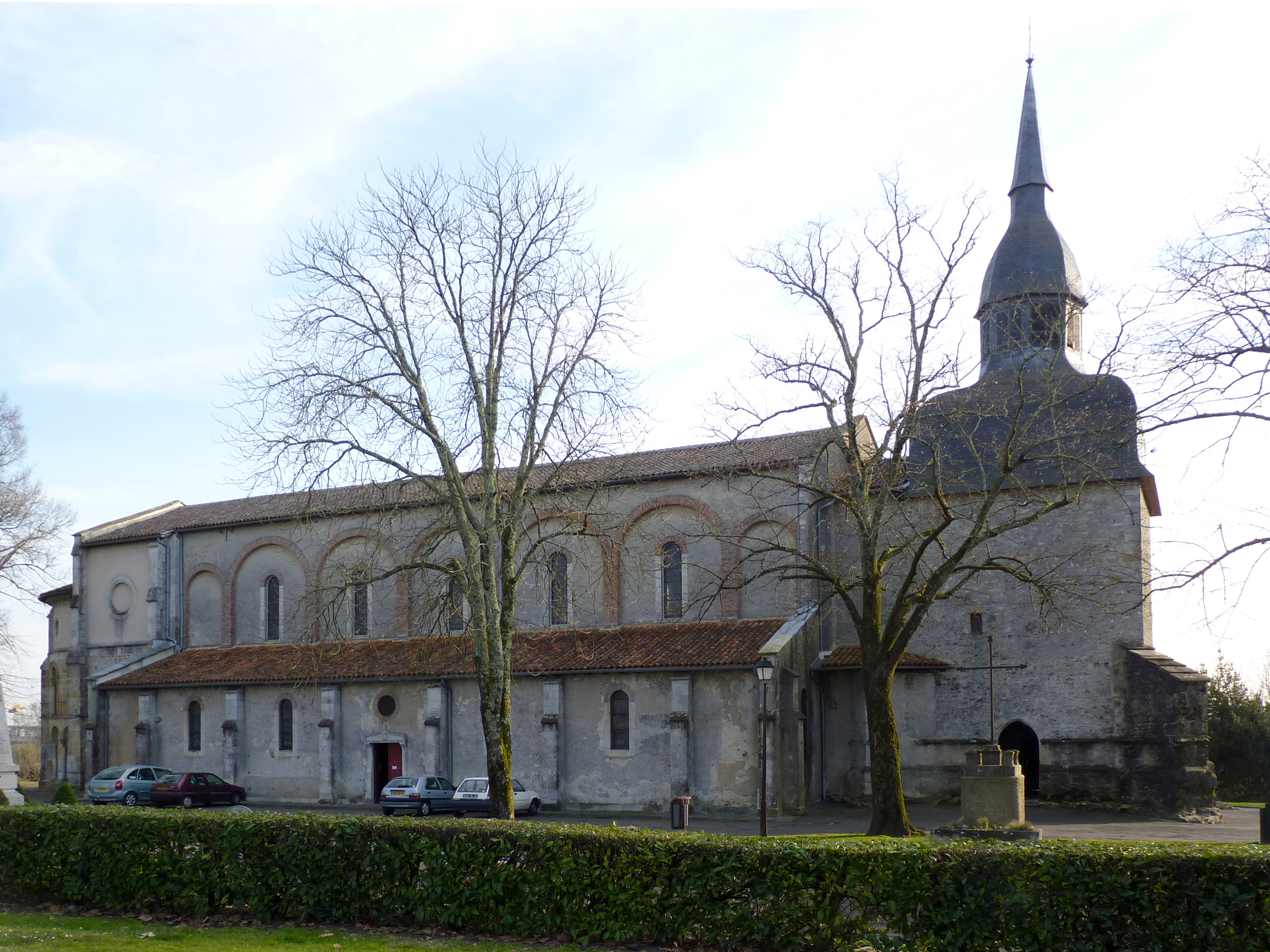 Eglise de Saint-Paul-lès-Dax